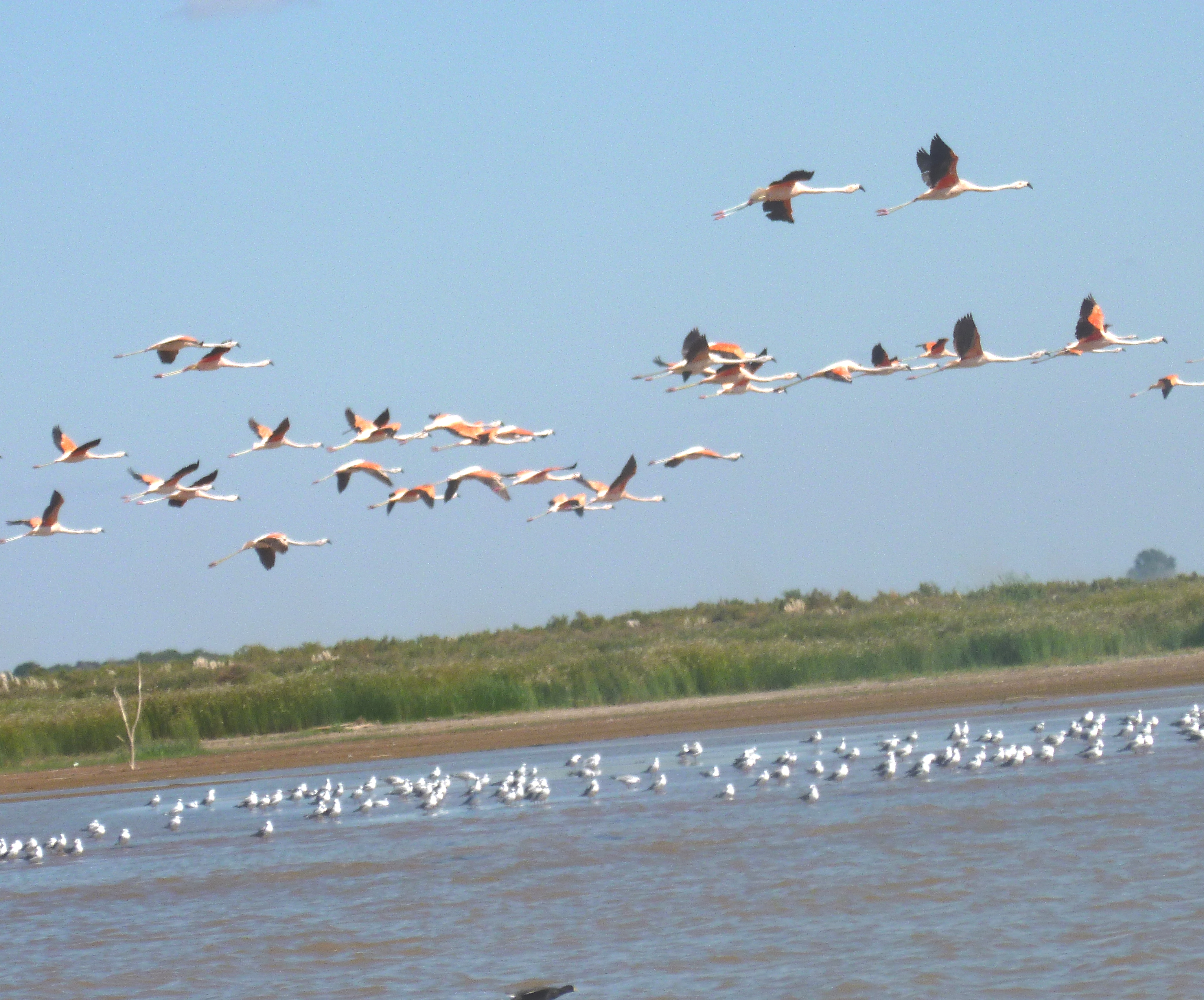 Flamencos volando y Cisnes Corcoba en los Bañados del Rio Dulce y Laguna Mar Chiquita(Reserva Provincial de Cordoba-Argentina_Declarada sitio Ramsar